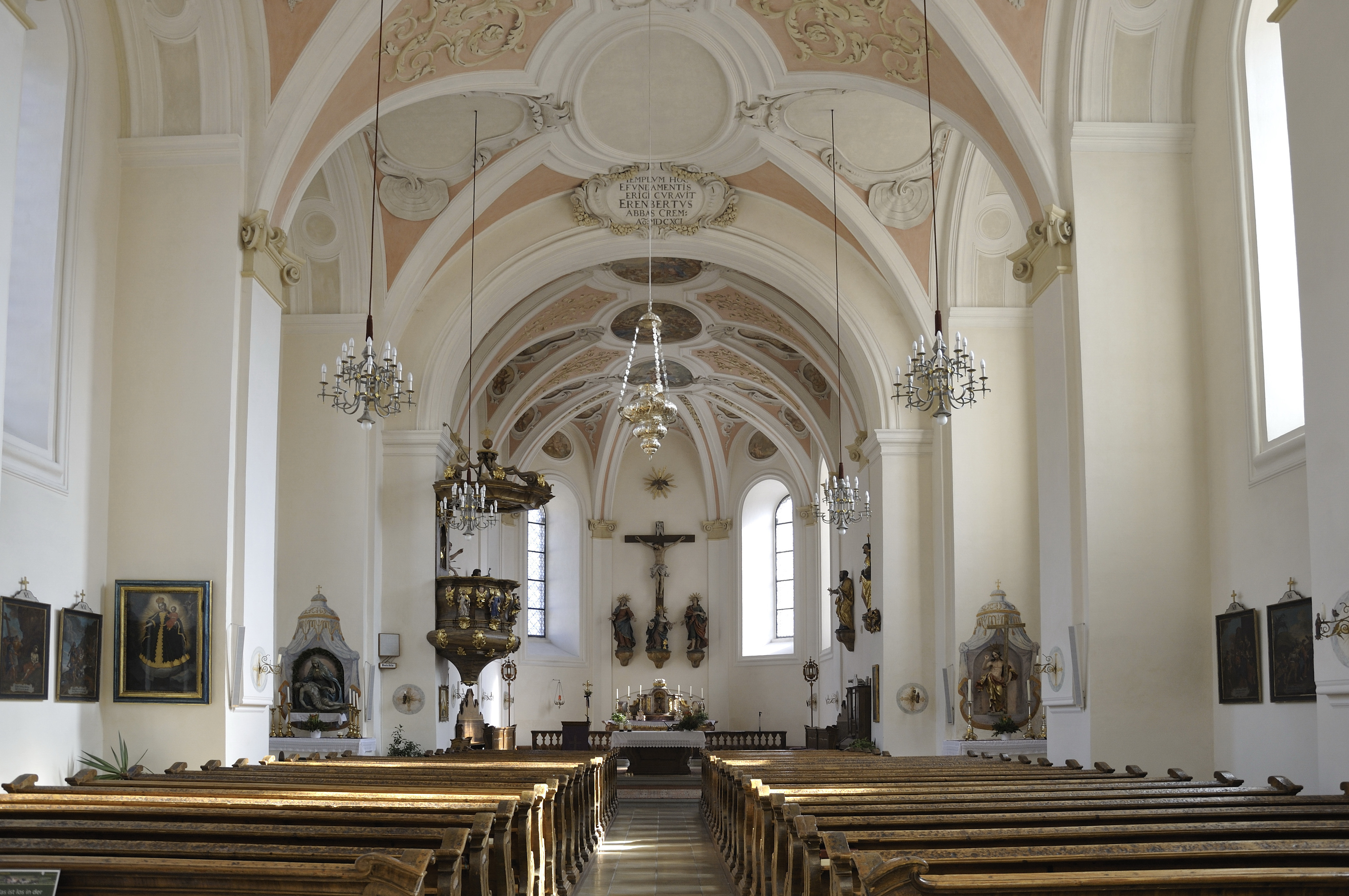 Barocke Pfarrkirche Viechtwang, Decken- und Wandgemälde von Wolfgang Andreas Heindl, ca. 1725